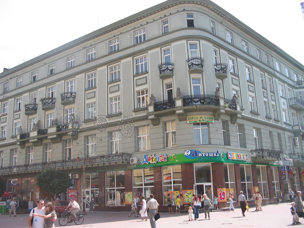 Downtown, Ivano-Frankivsk